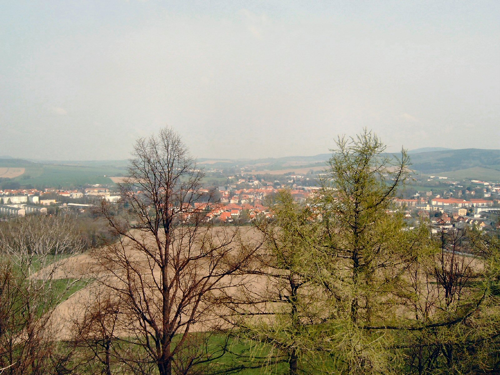 Neustadt in Sachsen von der Götzonger Höhe aus